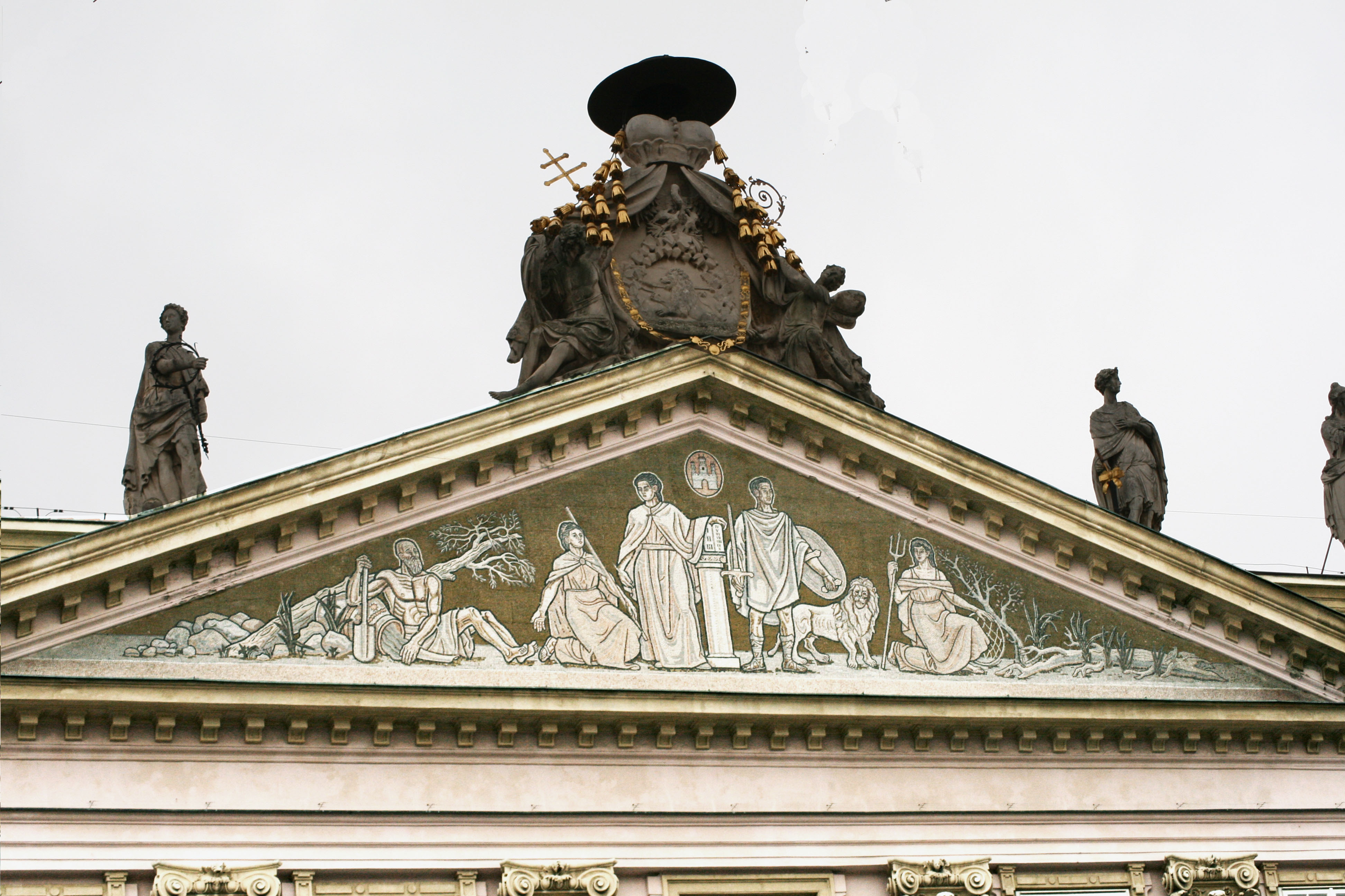 Mozaika z rokov 1959 - 1960 , dielo Ernesta Zmetáka, ktoré nahradilo zničenú alegorickú maľbu od Franza Antona Maulbertscha, na tympanóne Primaciálneho palaca v Bratislave